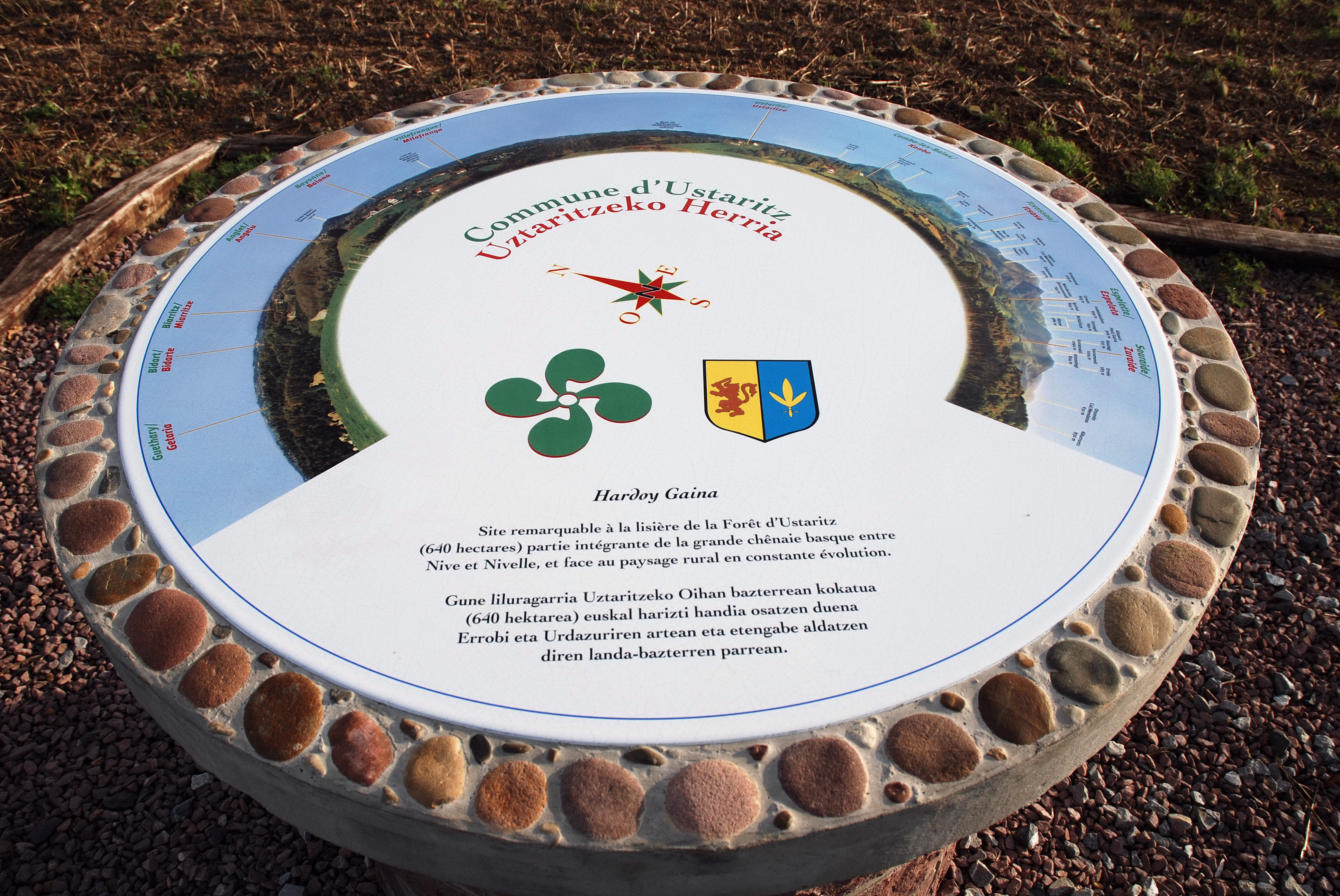 Ustaritz, table d'orientation. Photo prise le 31/12/06 par Harrieta171